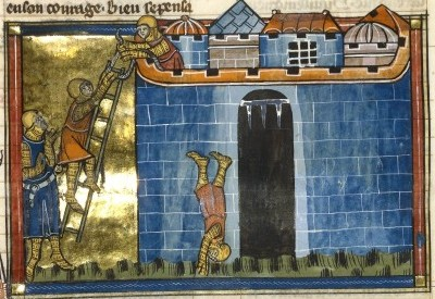 Trahison de Firuz